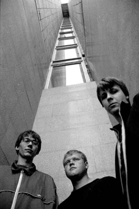 Hot Zex, 1999 год